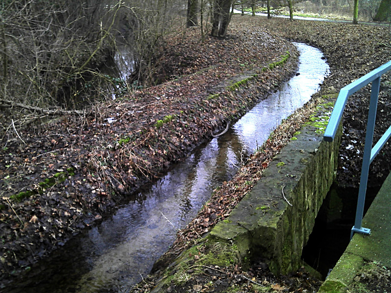 Wiederhergestelltes Wasserkreuz des Elsterfloßgrabens (im Bild oberhalb) über den Bach (unterhalb) bei Kötzschau, ca. 100 m vor dem Zusammefluss beider Gewässerläufe.